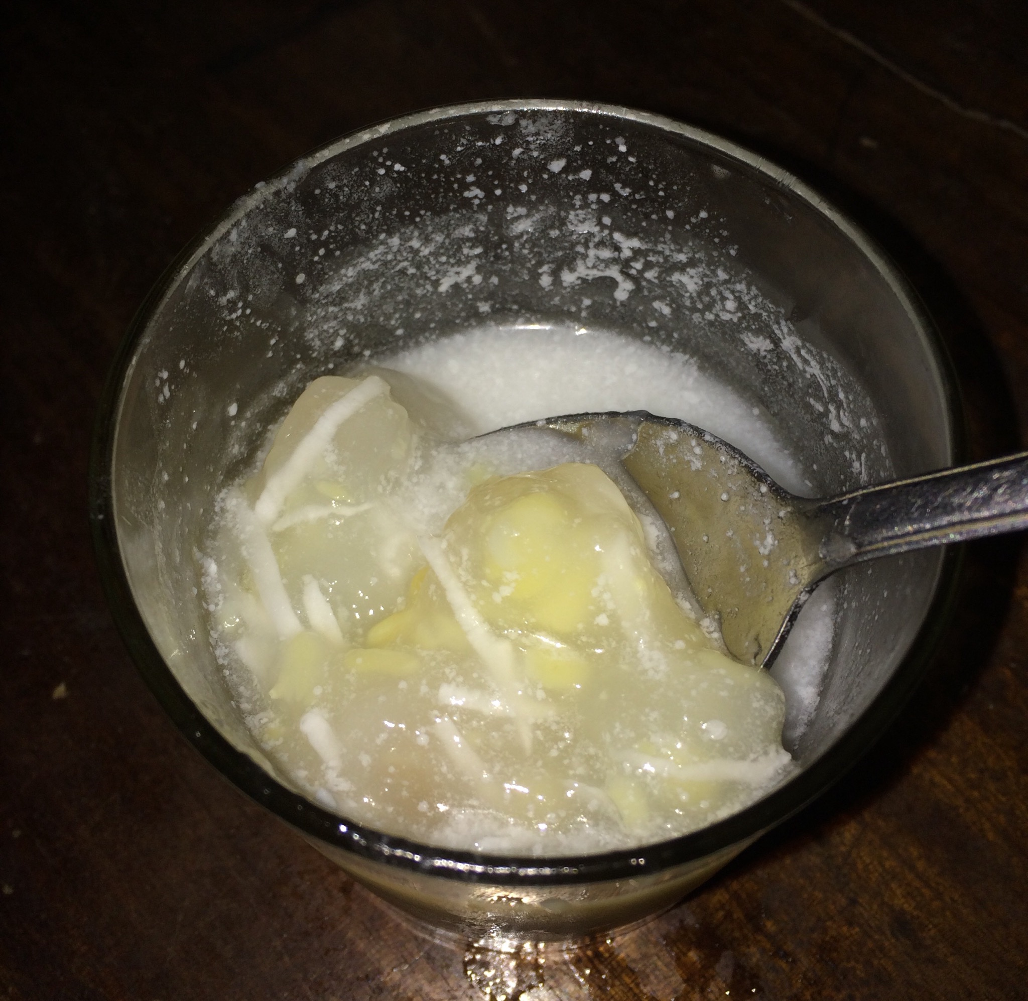 Coc che buoi